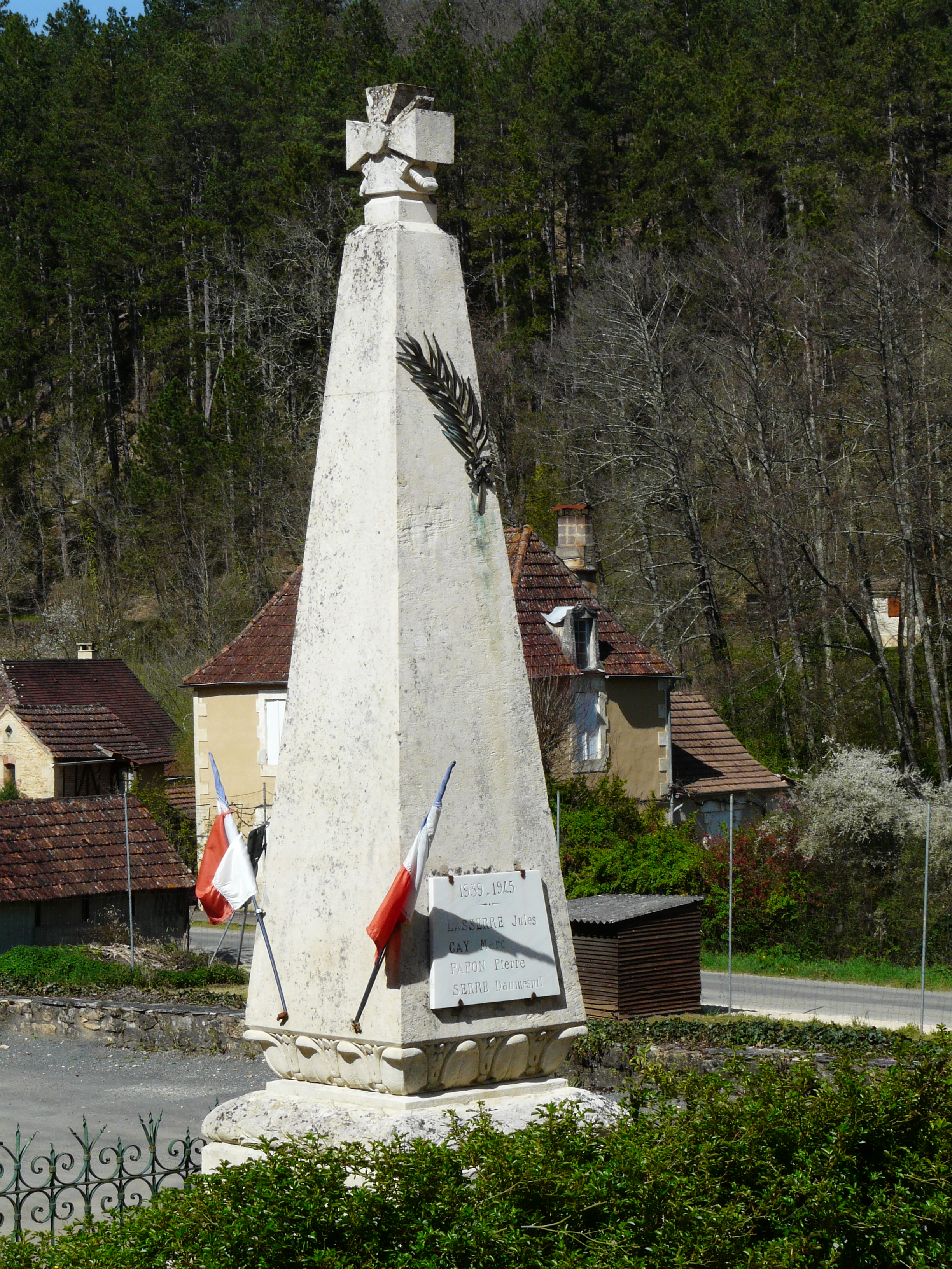 Le monument aux morts de Journiac, Dordogne, France.